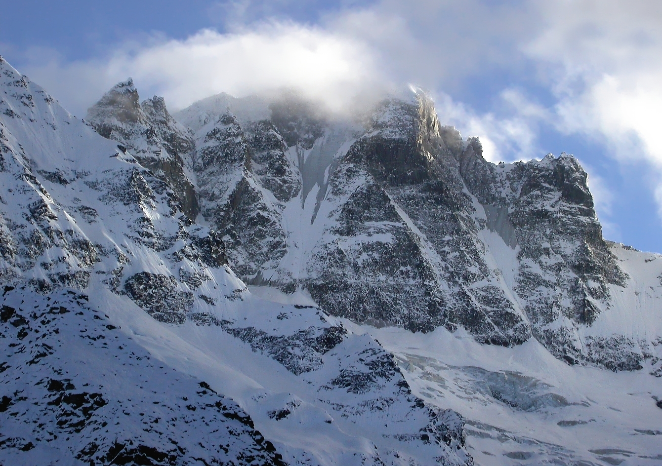 D:\WIKI\Becca di gay iniziali.jpg - Alpi Graie - Italy